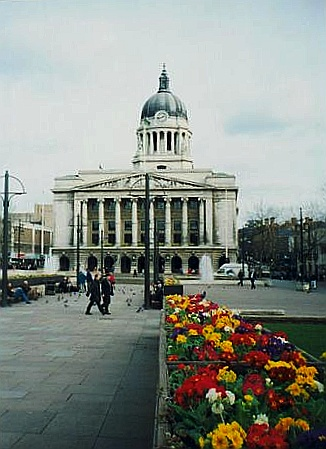 Der Marktplatz von Nottingham Fotografiert im Jahre 2000 von Alexblainelayder Freigegeben als public domain